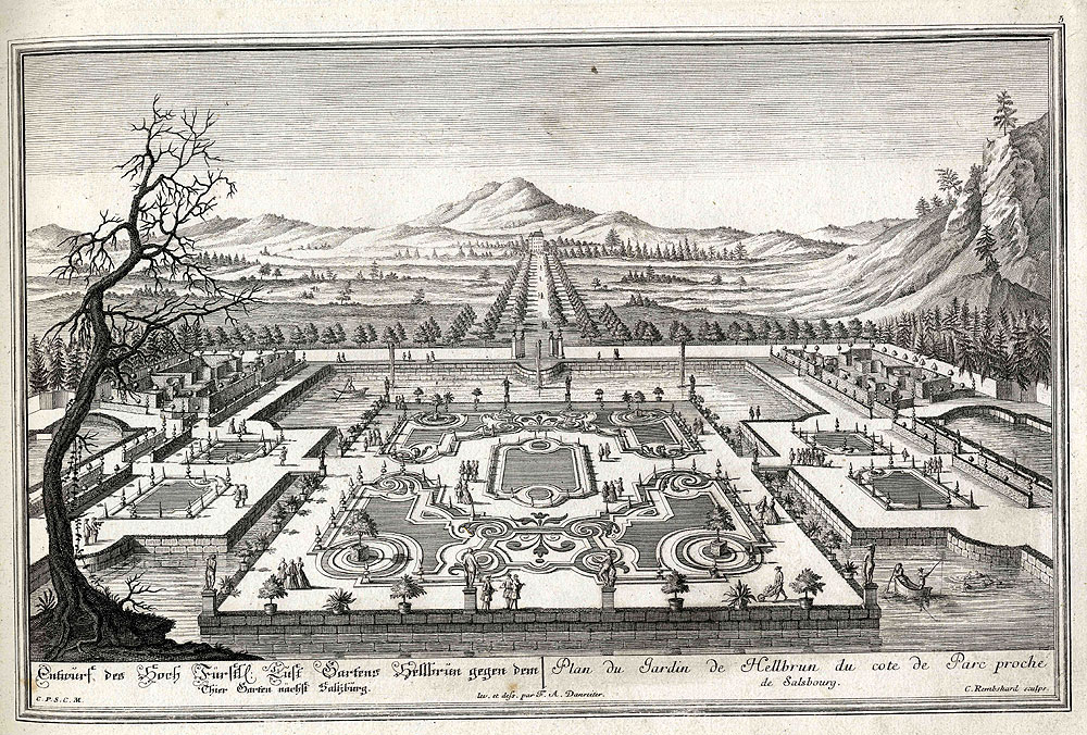 "Die Garten-Prospect von Hellbrun". Exemplar der Universitätsbibliothek Salzburg (dort beigebunden dem Werk Die Saltzburgische Kirchen-Prospect)